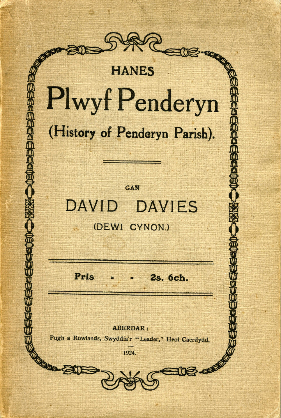 Clawr ail argraffiad "Hanes Plwyf Penderyn" David Davies (Dewi Cynon). Cyhoeddwyd yn 1924 gan Pugh & Rowlands, Aberdâr.